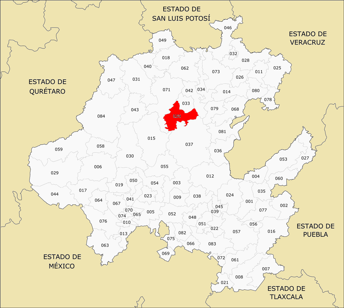 Municipios de Hidalgo